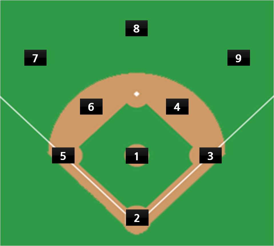 수비번호